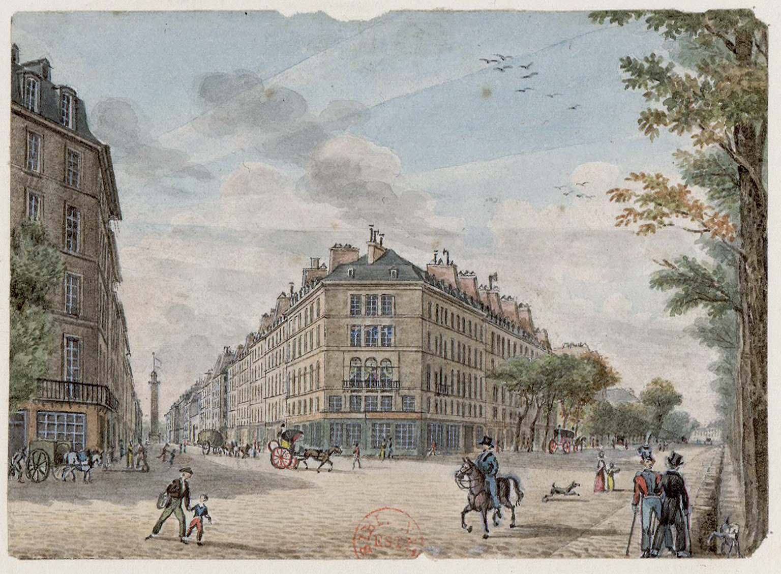 Plume, encre de Chine et aquarelle